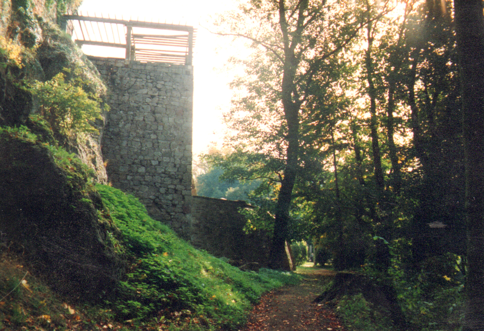 Unterm Schloss Altenstein - einstige Ringmauer der Burg und umlaufender Parkweg.